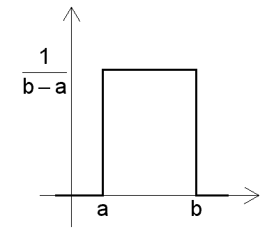 Funzione di densità di probabilità della variabile casuale rettangolare Grafico disegnato con R plot(0,0,xlim=c(-2,6),ylim=c(-1,6),col="white");arrows(-1,0,6,0);arrows(0,-1,0,6) lines(c(-0.5,1,1,4,4,5),c(0,0,4,4,0,0),lwd=3) text(1,0,"a",adj=c(0.5,1.2),cex=2);text(4,0,"b",adj=c(0.5,1.2),cex=2) text(0,4,expression(frac(1,b-a)),adj=c(1.1,0.5),cex=2) Categoria:Variabili casuali